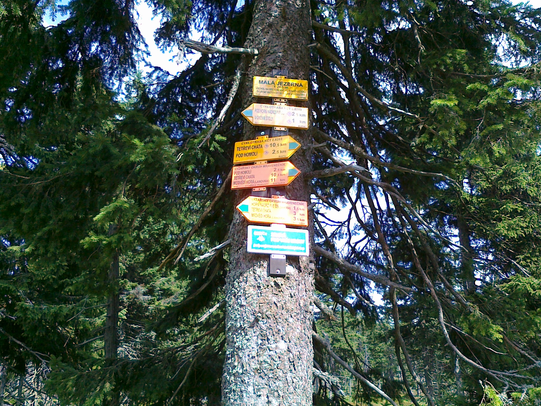 Tablice informacyjne na skrzyżowaniu o nazwie Malá Jezerna - 1265 m n.p.m.